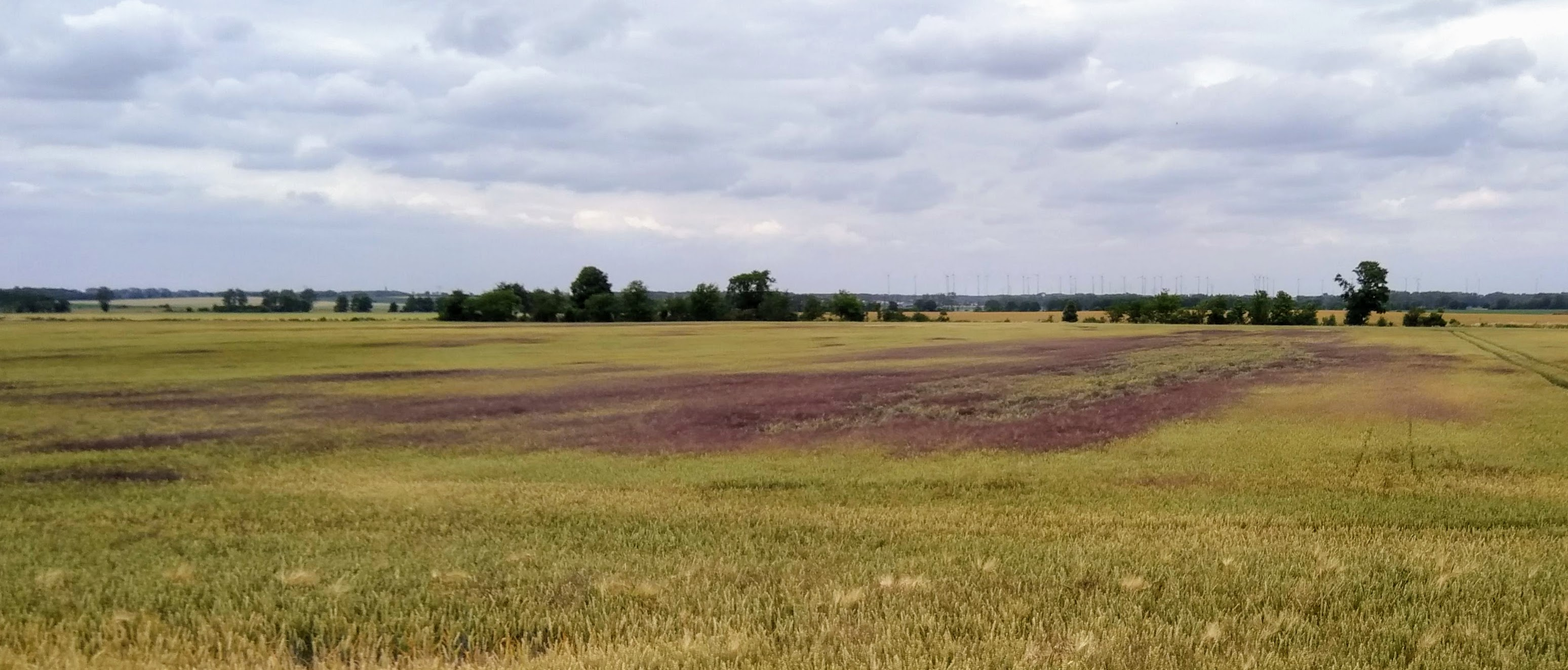 Glyphosatresistenz beim Ackerfuchsschwanz